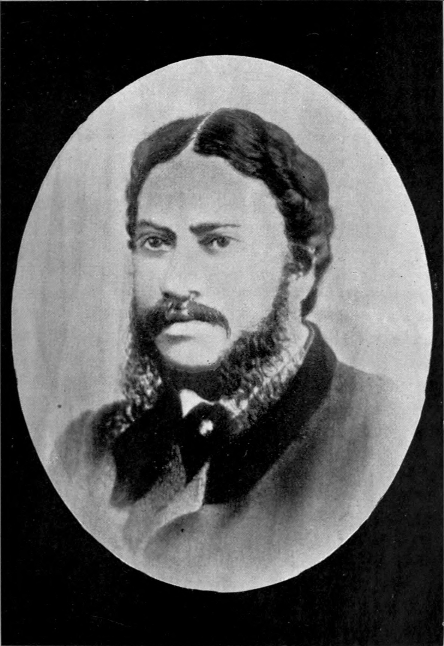 Ramtanu Page 067.jpg